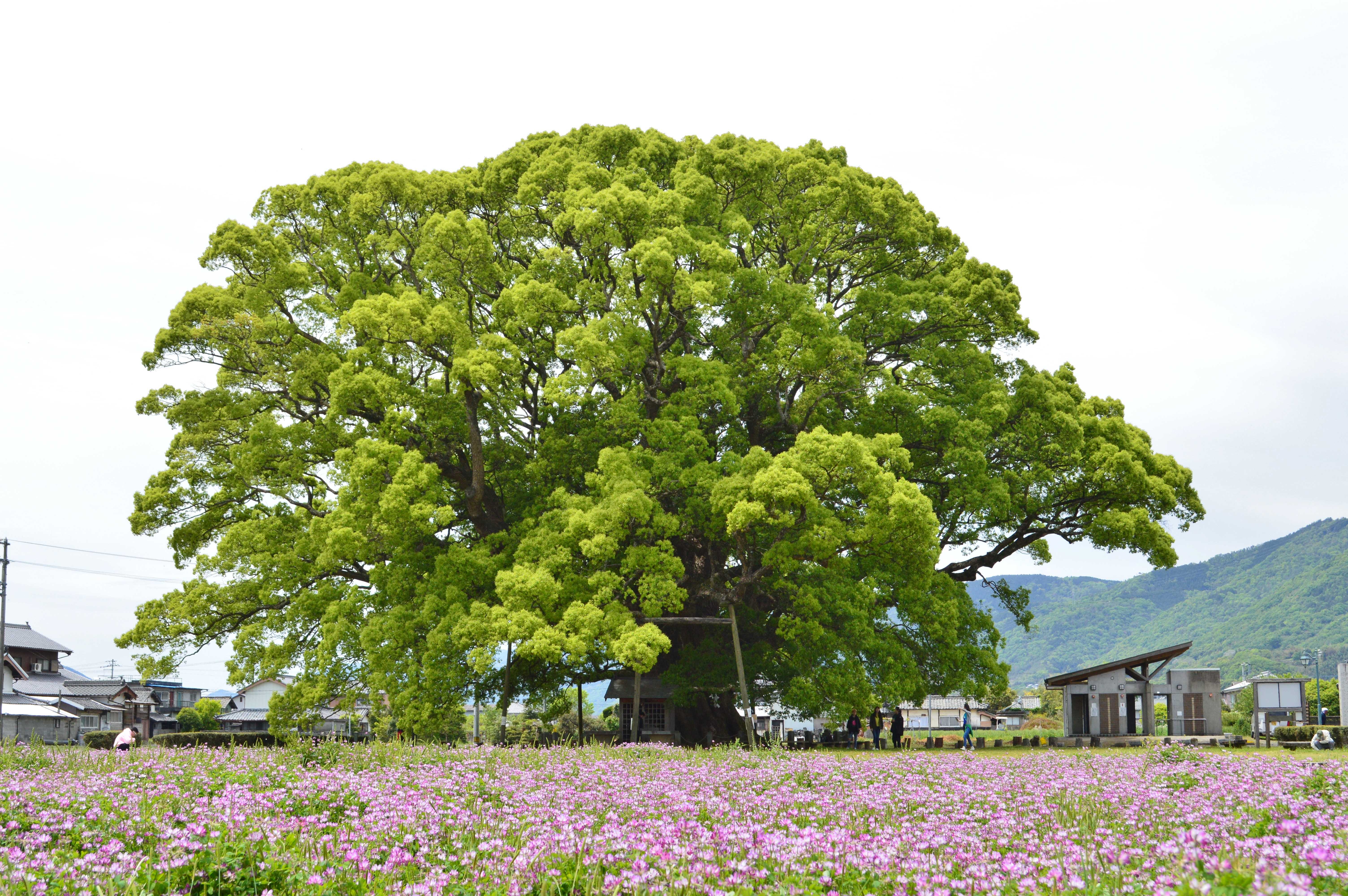 加茂の大クス Nikon D3200